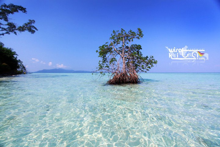 Pulau Galean Karimunjawa